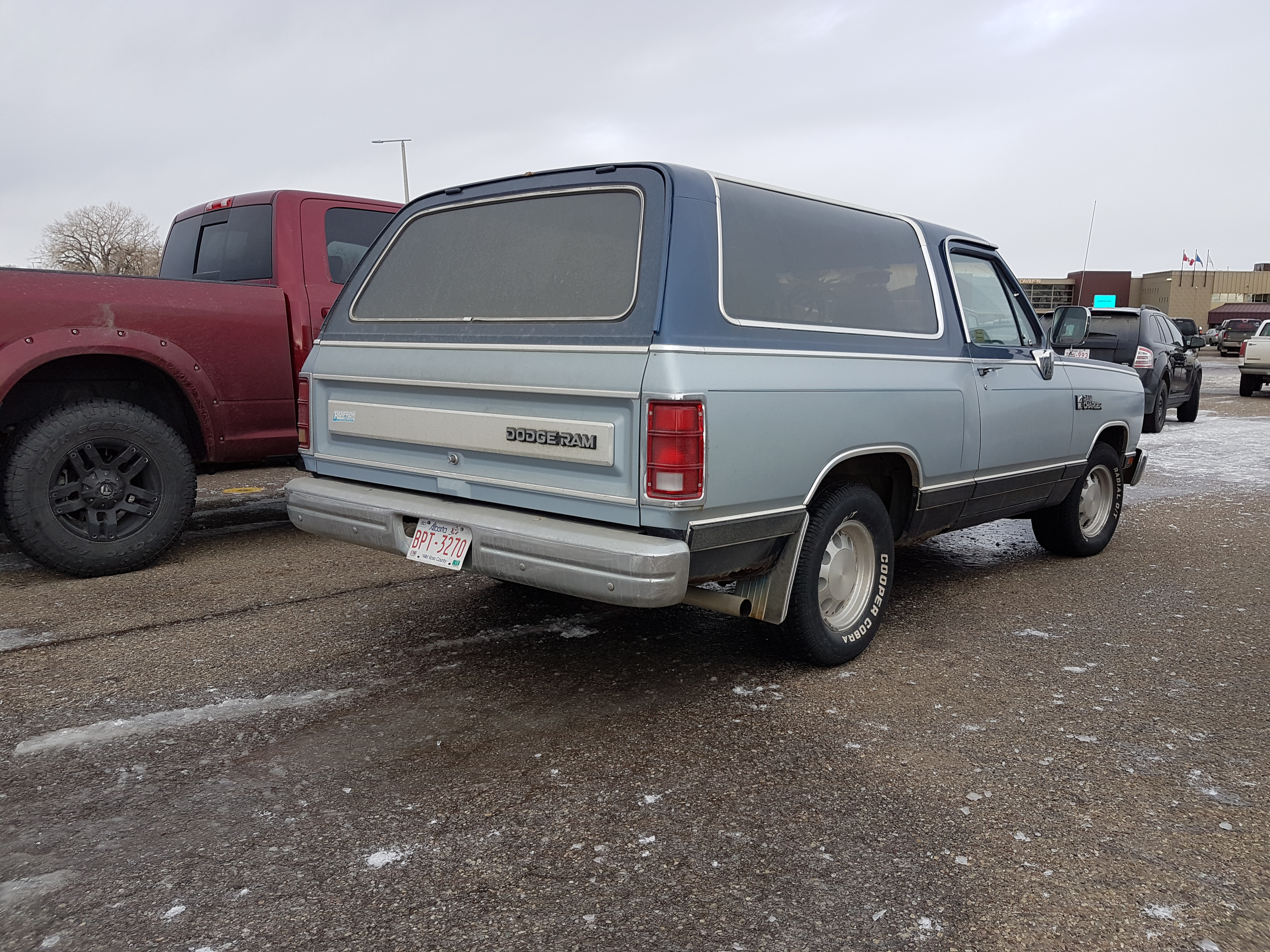 Dodge Ram Charger